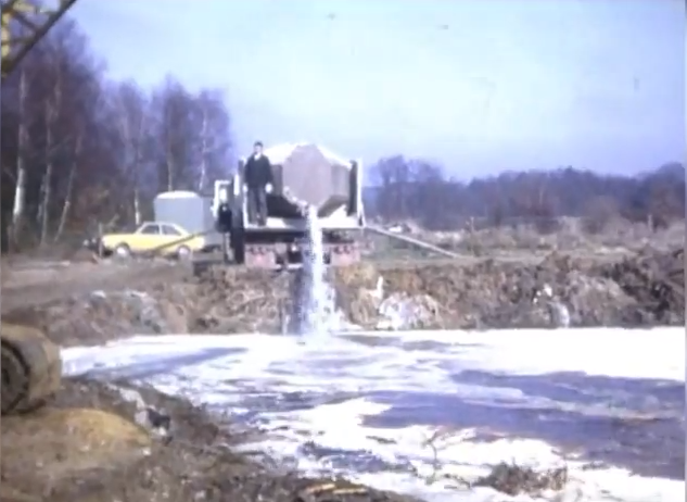 Teerputten van Vasse, geblust kalk wordt toegevoegd zodat de bovenste laag wordt geneutraliseerd.